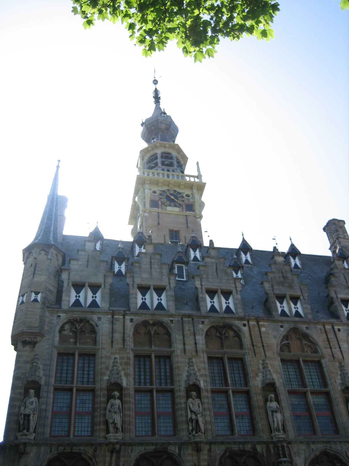 D'Stadhaus vu Veere.